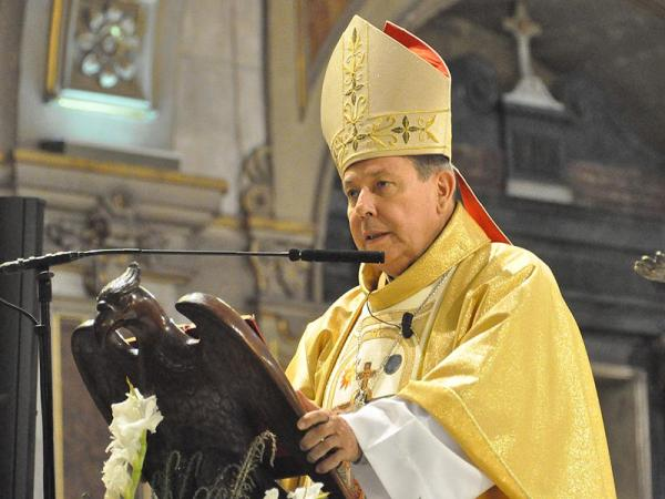 Arzobispo Octavio Ruiz Arenas